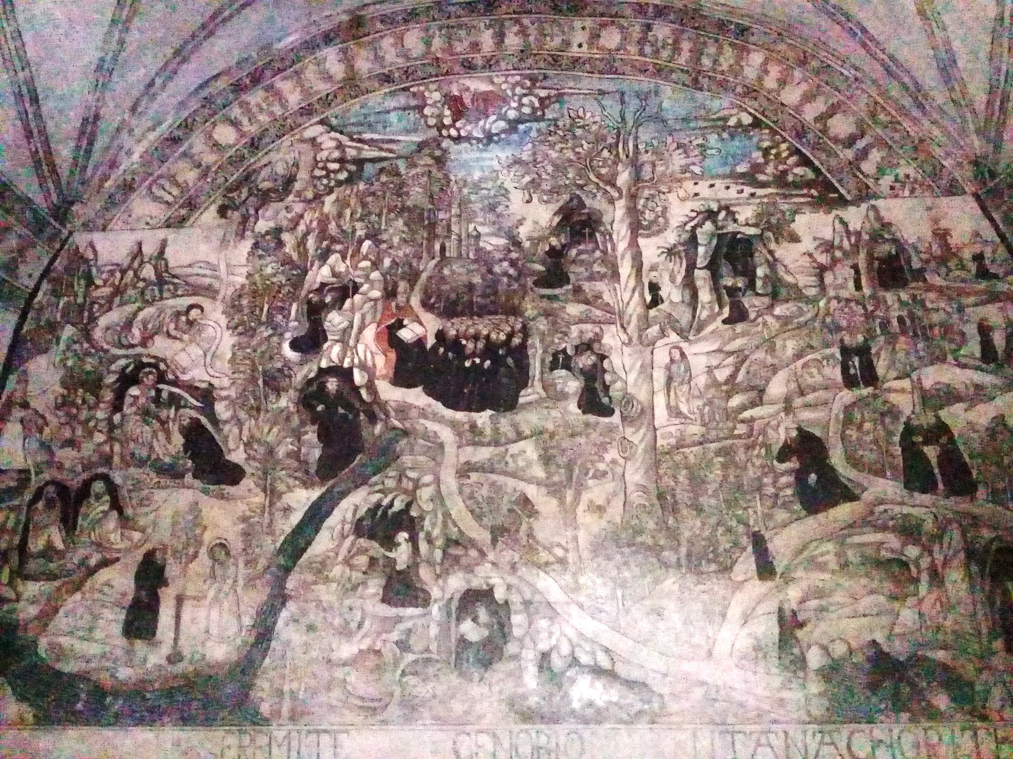 Templo y exconvento de San Nicolás de Tolentino (Actopan).